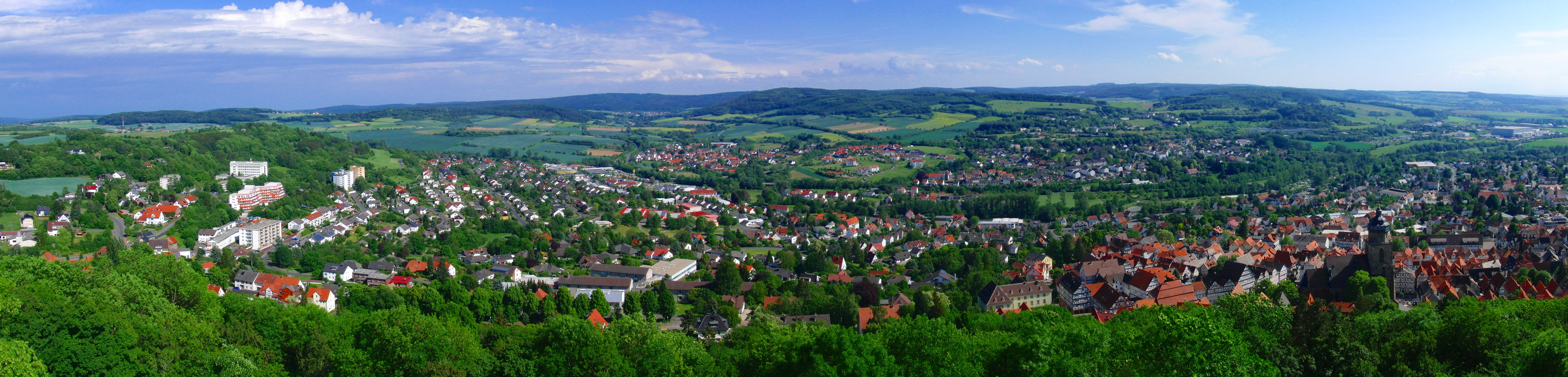 Panorama von Homberg (Efze) (Hessen), aufgenommen von der Hohenburg (Homberg) Hinweis: erstellt mit der Freeware Hugin 2010